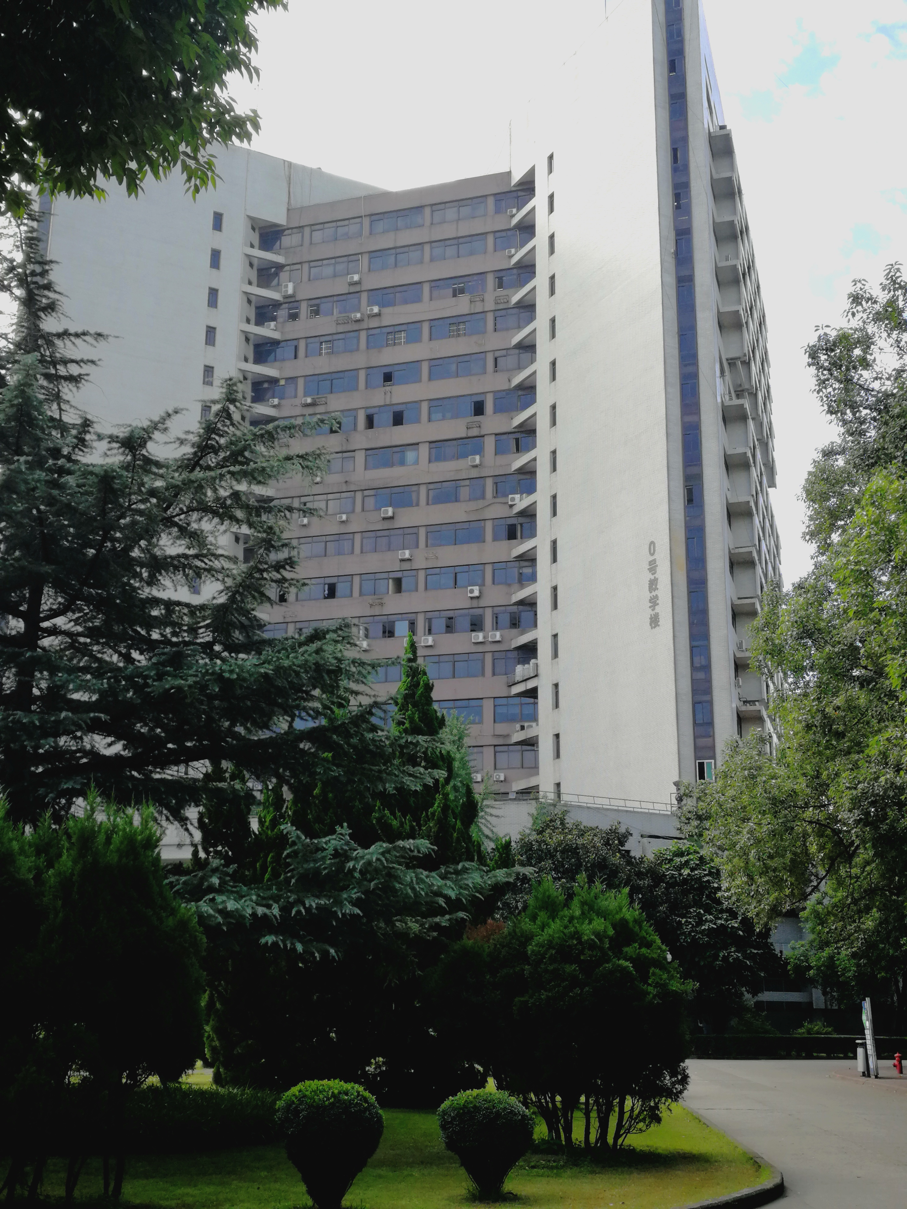 中文（中国大陆）: 西南交通大学九里校区0号教学楼